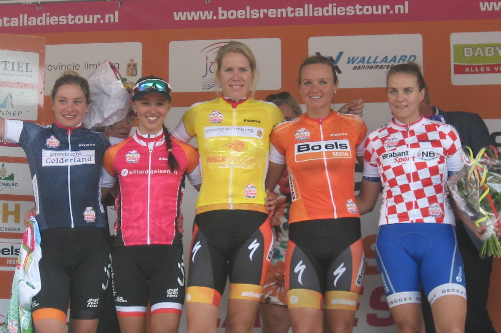 Roxane Knetemann, Katarzyna Niewiadoma, Ellen van Dijk, Chantal Blaak en Winanda Spoor na de derde etappe van de Boels Ladies Tour 2016 in Sittard, Limburg.